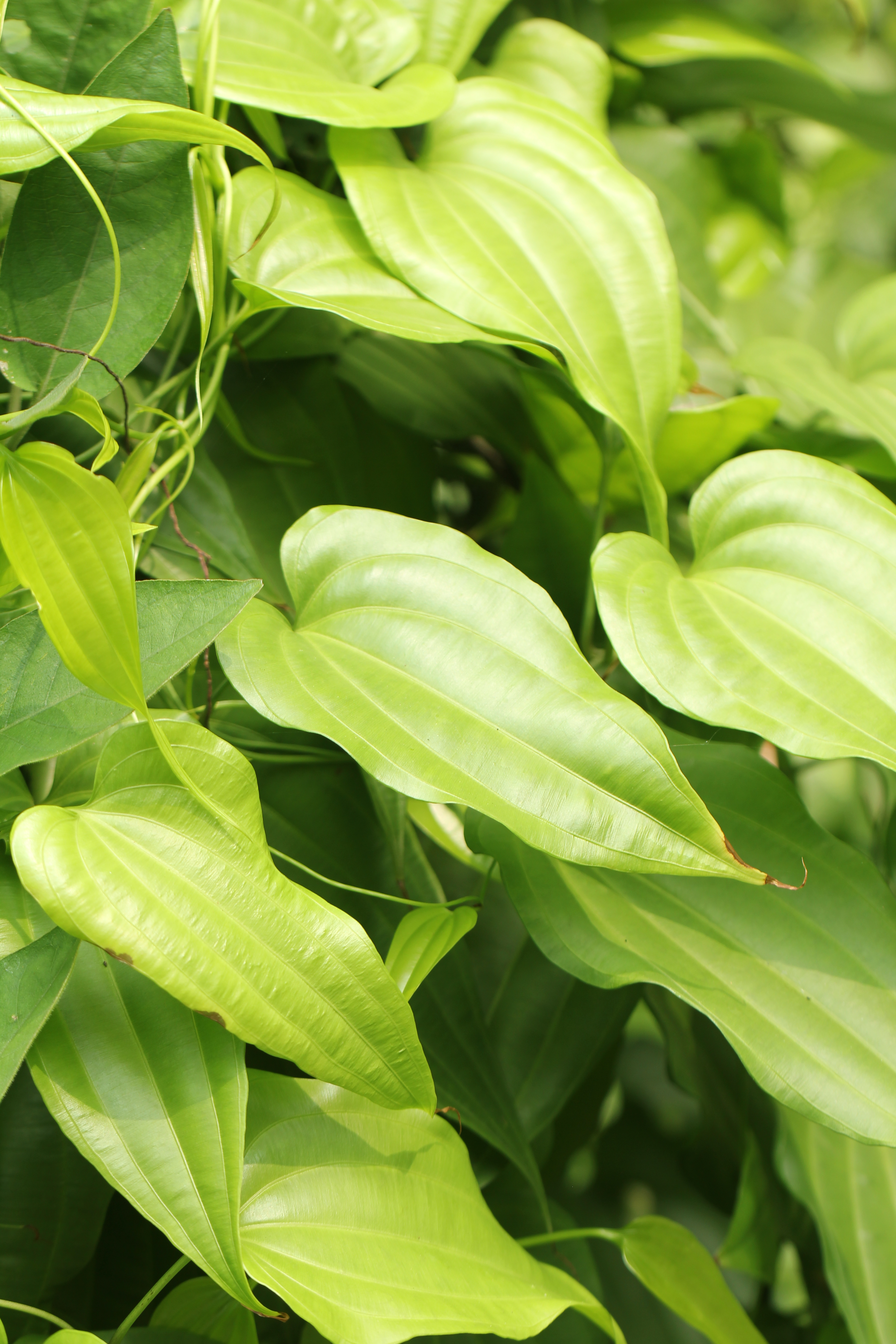 百部叶片，摄于广东中医药大学